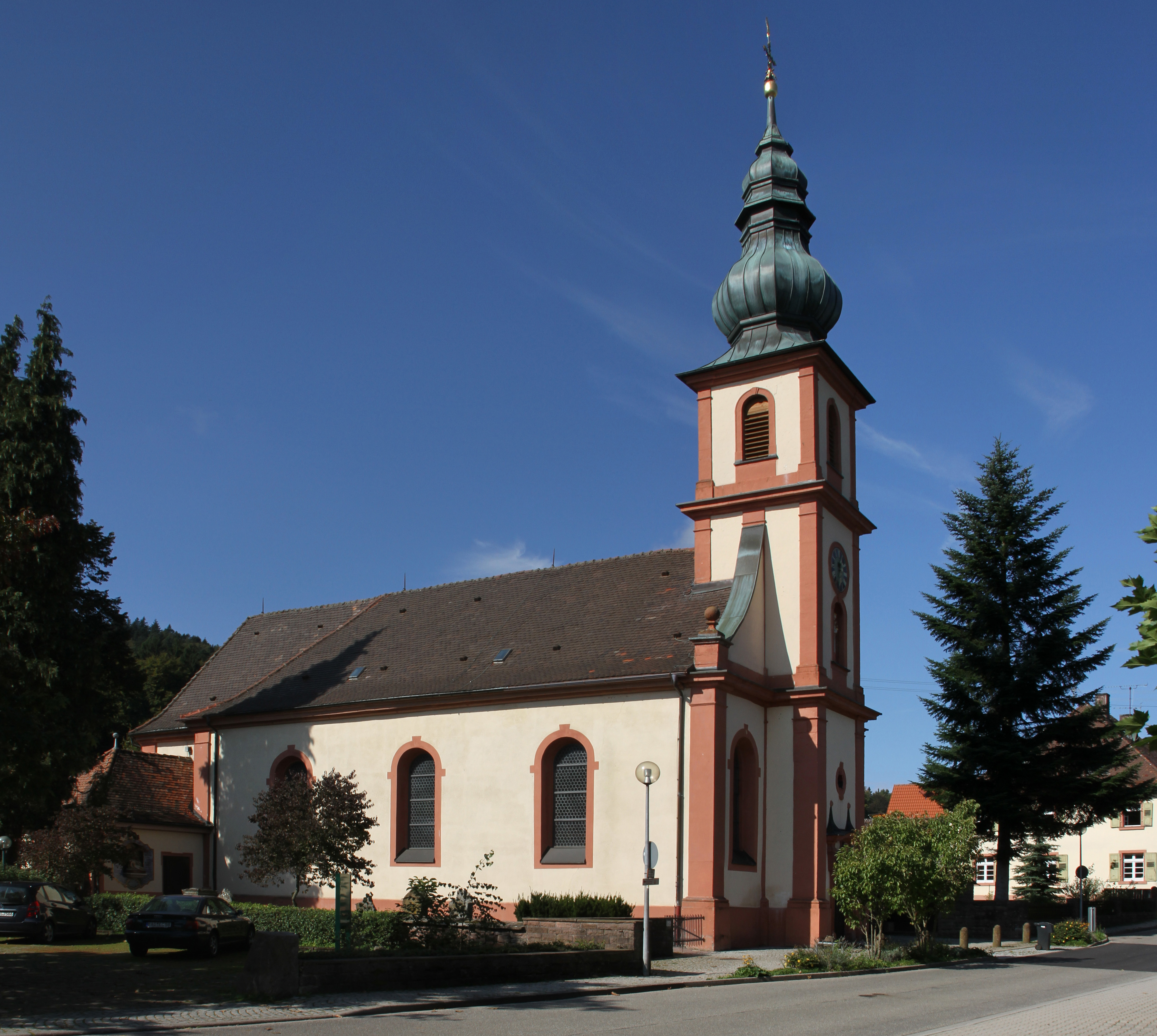 Die barocke Kirche "Maria Hilf" in Moosbronn (Ortsteil von Gaggenau) wurde 1749 geweiht.